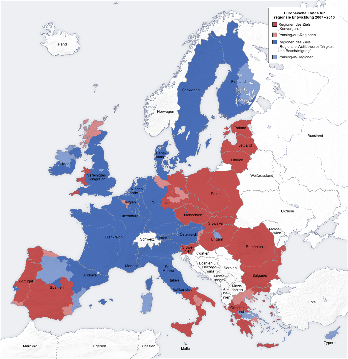 Europäische Fonds für regionale Entwicklung 2007-2013, Karte de